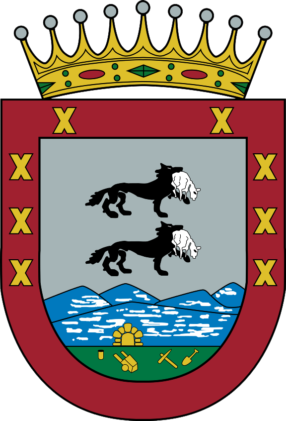 Abanto Zierbenako armarria, Meatzaldea (Bizkaia). Auzoak: Las Carreras, Gallarta, Manzanal, Las Cortes, Santa Juliana Abanto, Solako, Pikon, Kareaga, Triano, Sanfuentes, Putxeta, Kotorrio, Kotarro, Florida, Olabarrieta, San Pedro Abanto, Loredo, Labarga, Santa Lucia, Matxalen etxaldea, Bao, Murrieta, Errebilla, Campodiego, Fonso, Cerrillo, Balastera, Harrobiak, Labardaska, El Once, Bernatxo, San Lorenzo.